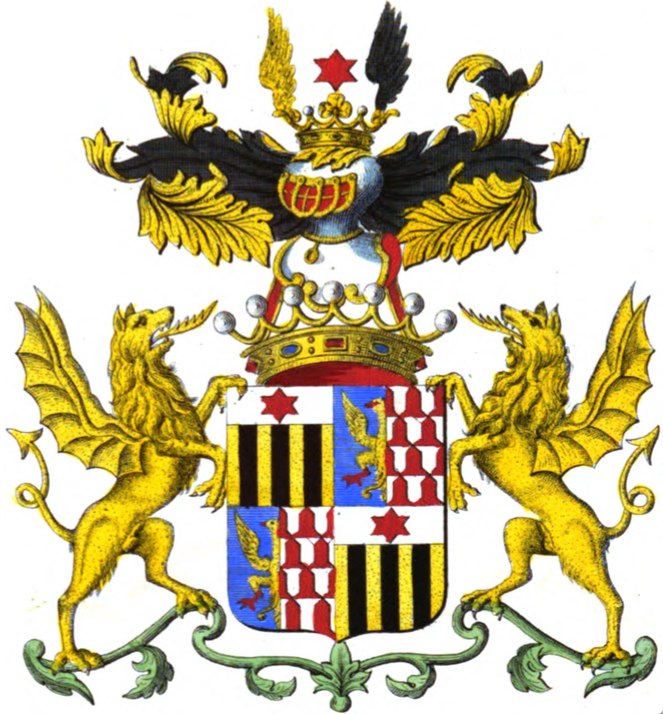 Armoiries de la famille van den Branden - attention, le vairé n'est pas bon, il est de gueules et argent alors qu'il devrait être d'argent et de gueules